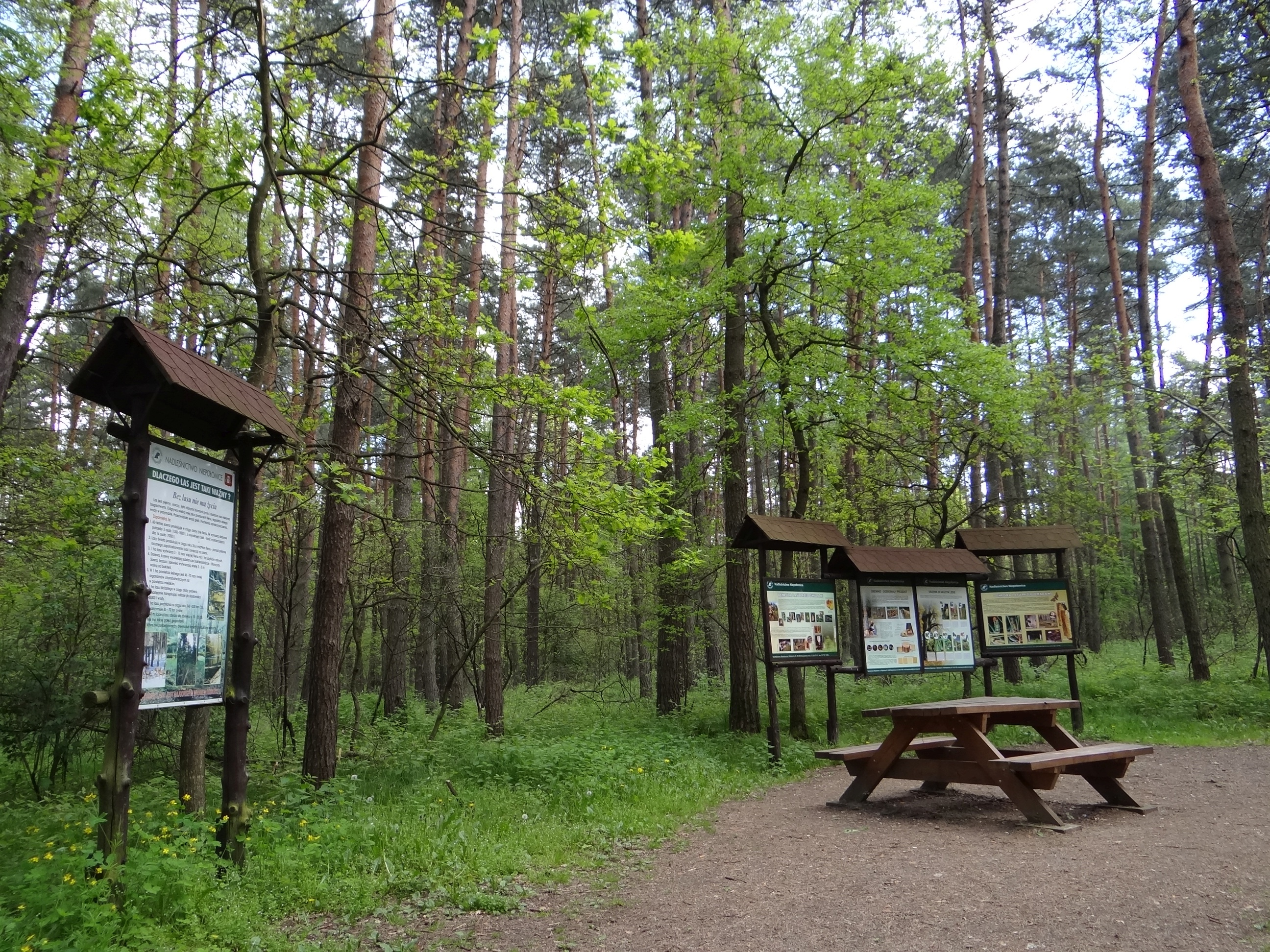 Miejsce rekreacyjne dla turystów